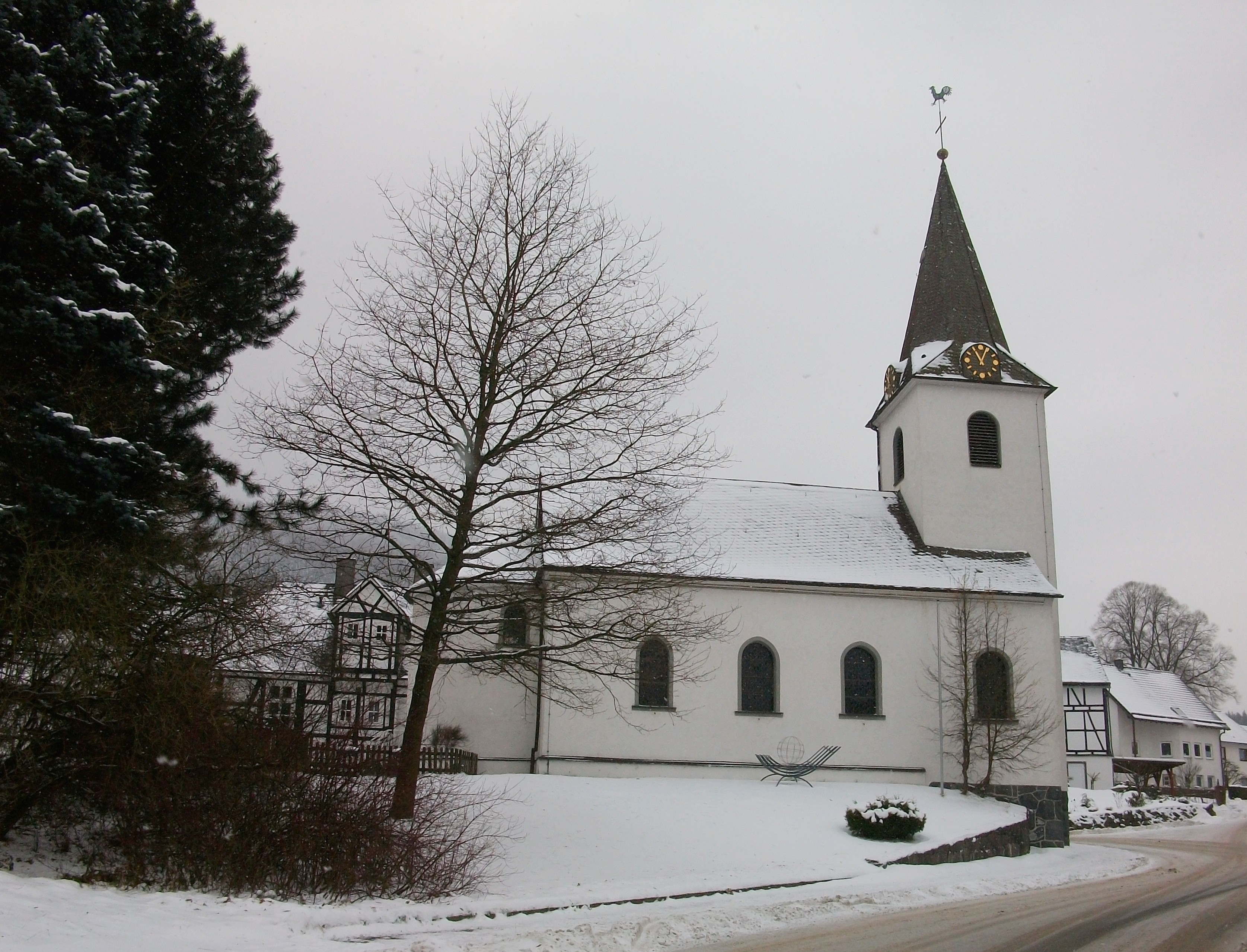 Kirche in Olsberg-Helmeringhausen (Germany)